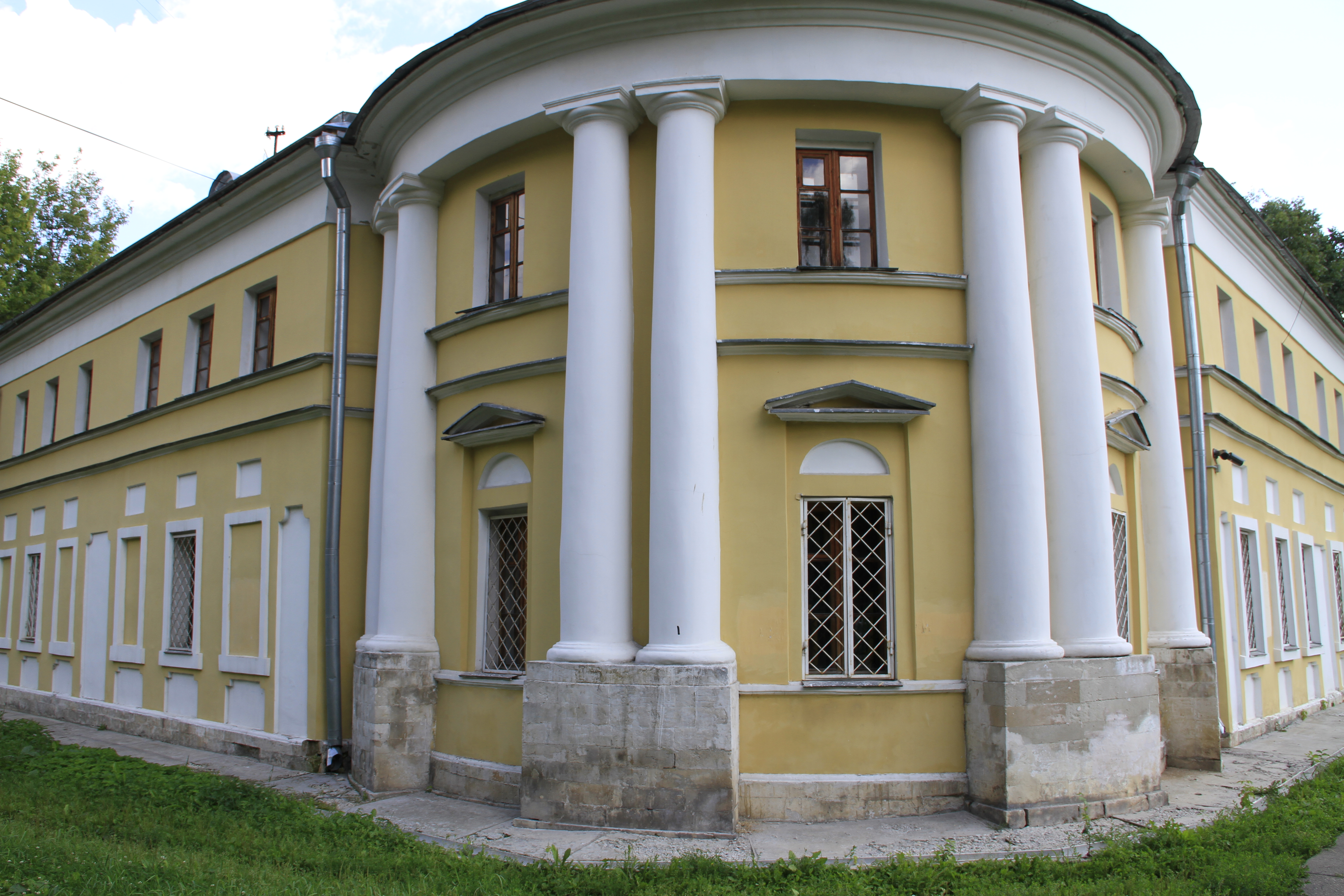 Флигель усадьбы Бекетовых «Зюзино» (Москва, Перекопская улица, 7, 9)